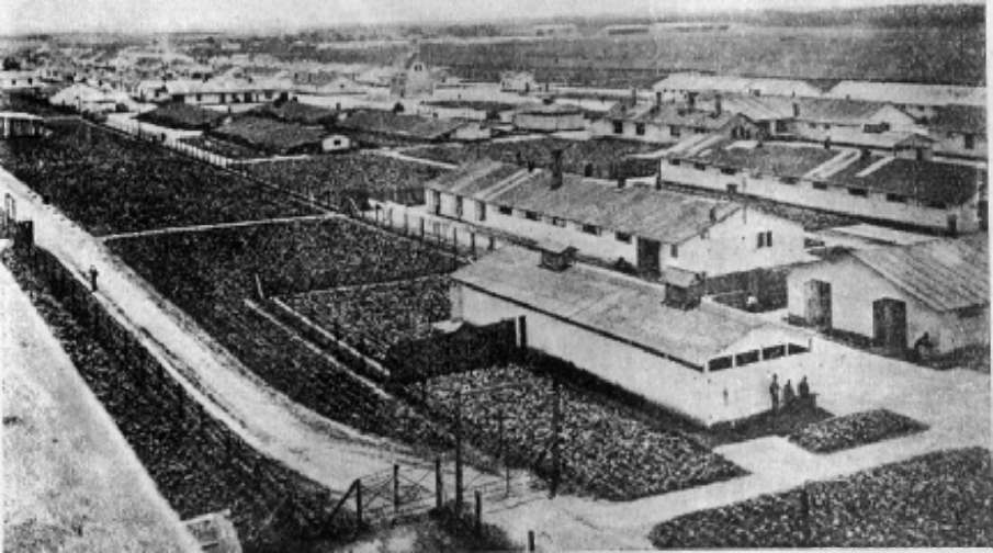 Общий вид концлагеря Талергоф в 1917 г. Альбом снимков из концентрационного лагеря для военно-арестованных русских галичан и буковинцев в Талергофе, в Штирии, 1914-1917 гг. Издание Талергофского комитета. Львов, 1923.